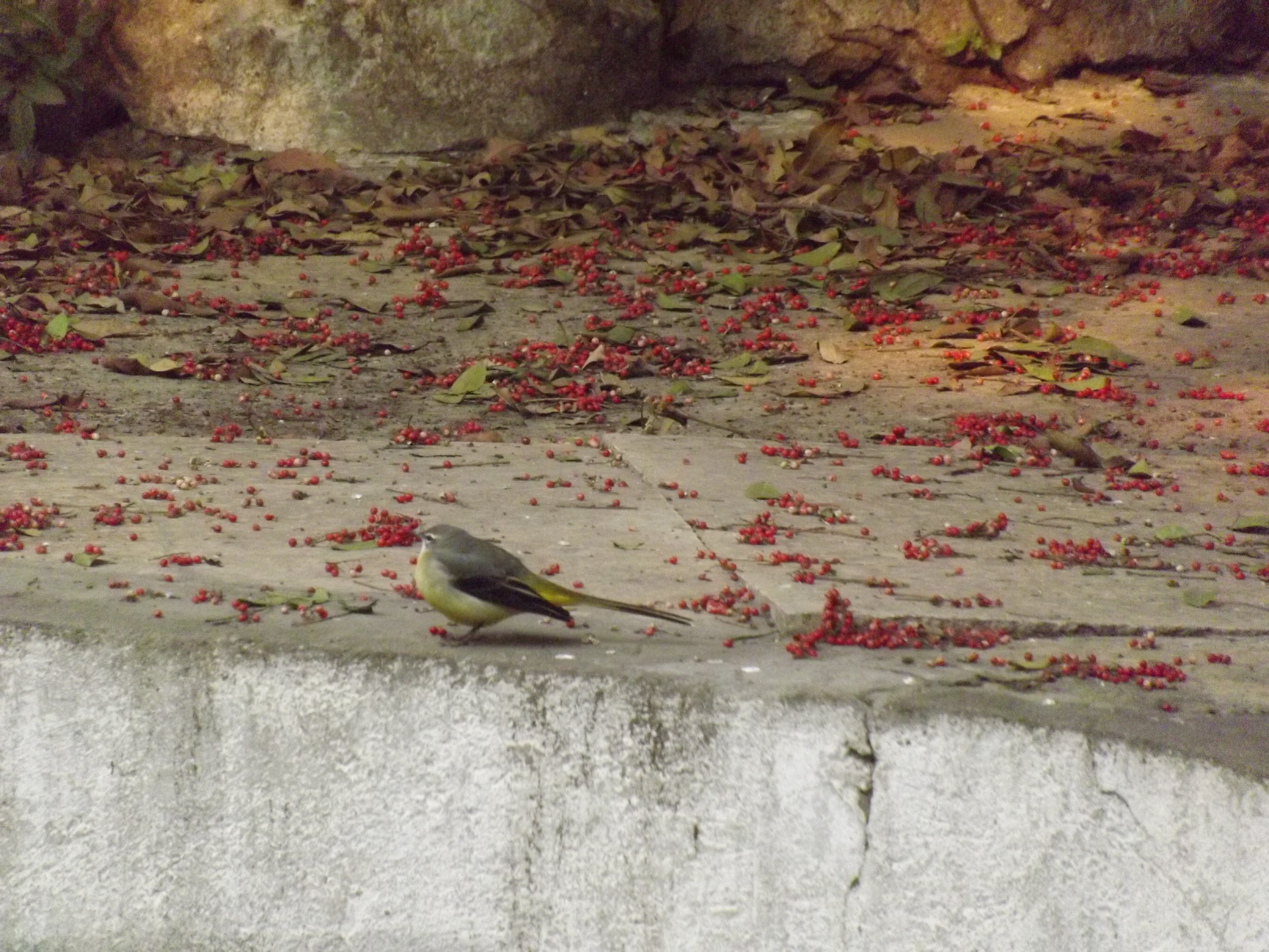 ابوفصادة رمادي (ذعرة رمادية) في حديقة حيوان النزهة - الاسكندرية